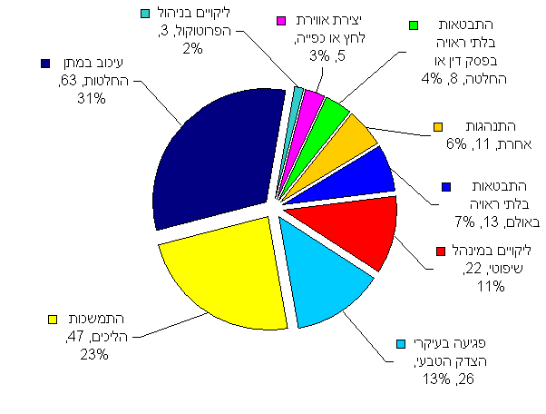 גרף המתאר את התפלגות התלונות לנציבת תלונות הציבור על שופטים שנמצאו מוצדקות בשנת 2006 על פי סוגן